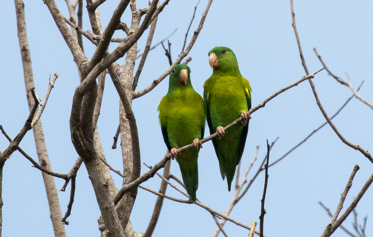 Orange-chinned Parakeet - Darien - Panama CD5A7536